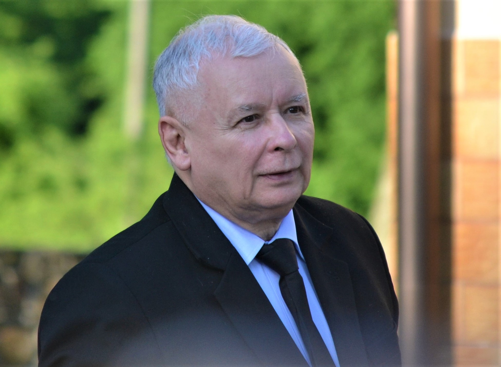 Die Partei-Pilger zum Geburtsort des heiligen Andreas Bobola